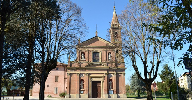 Vista della facciata della Parrocchiale di San Vitale dal viale alberato